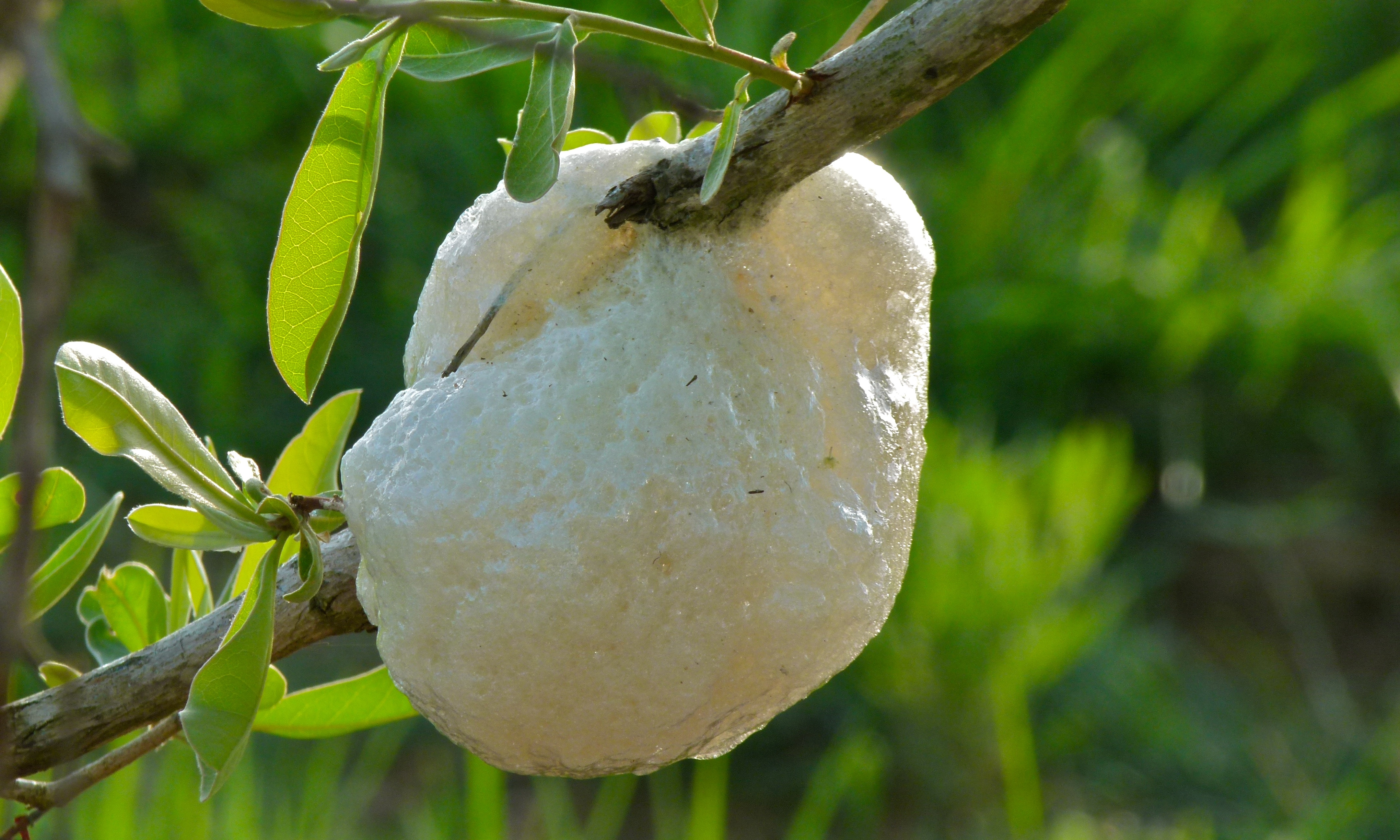 H1-1 East of Pretoriuskop, Kruger NP, SOUTH AFRICA